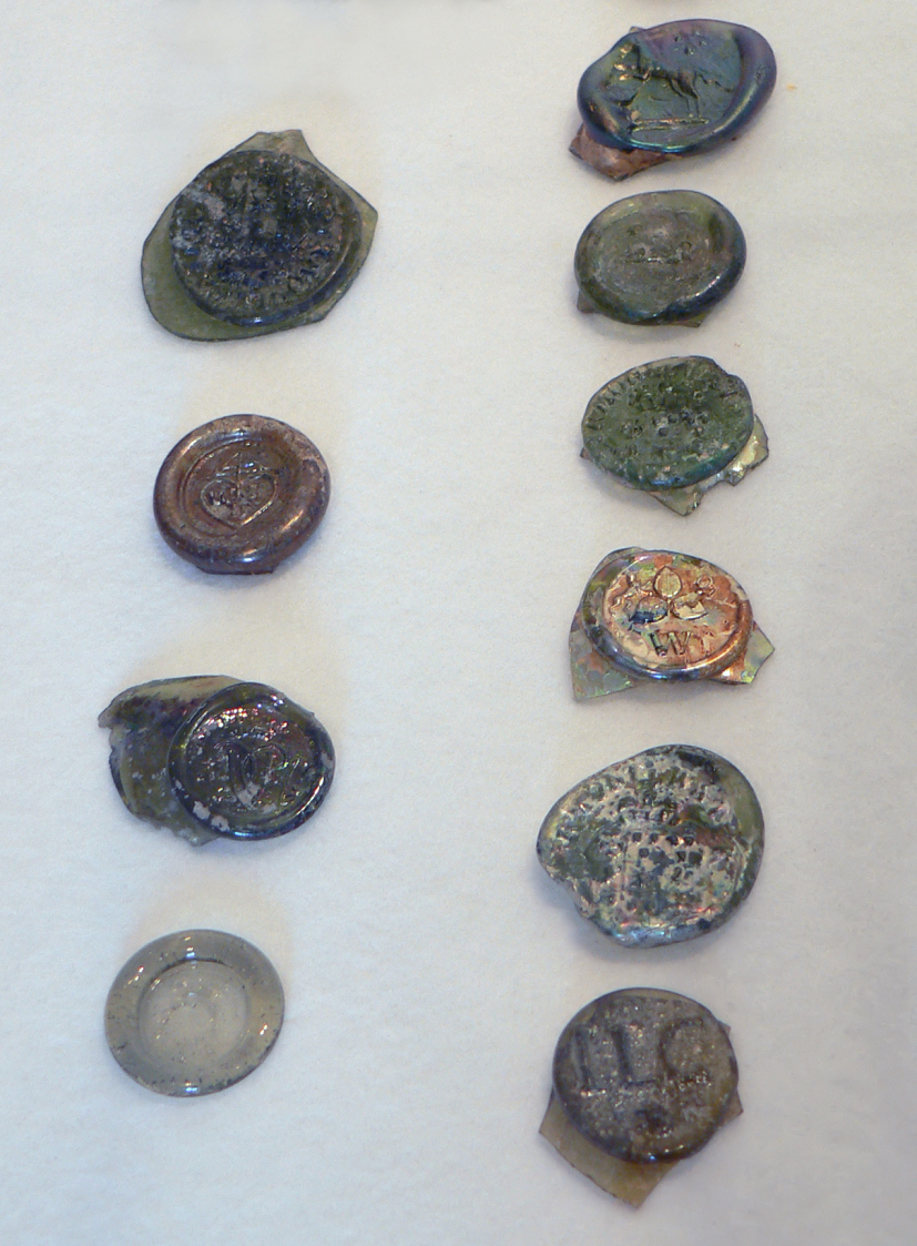 Bei den Ausgrabungen gefundene Flaschensiegel der Glasmanufaktur Holzen im Erich-Mäder-Glasmuseum in Grünenplan